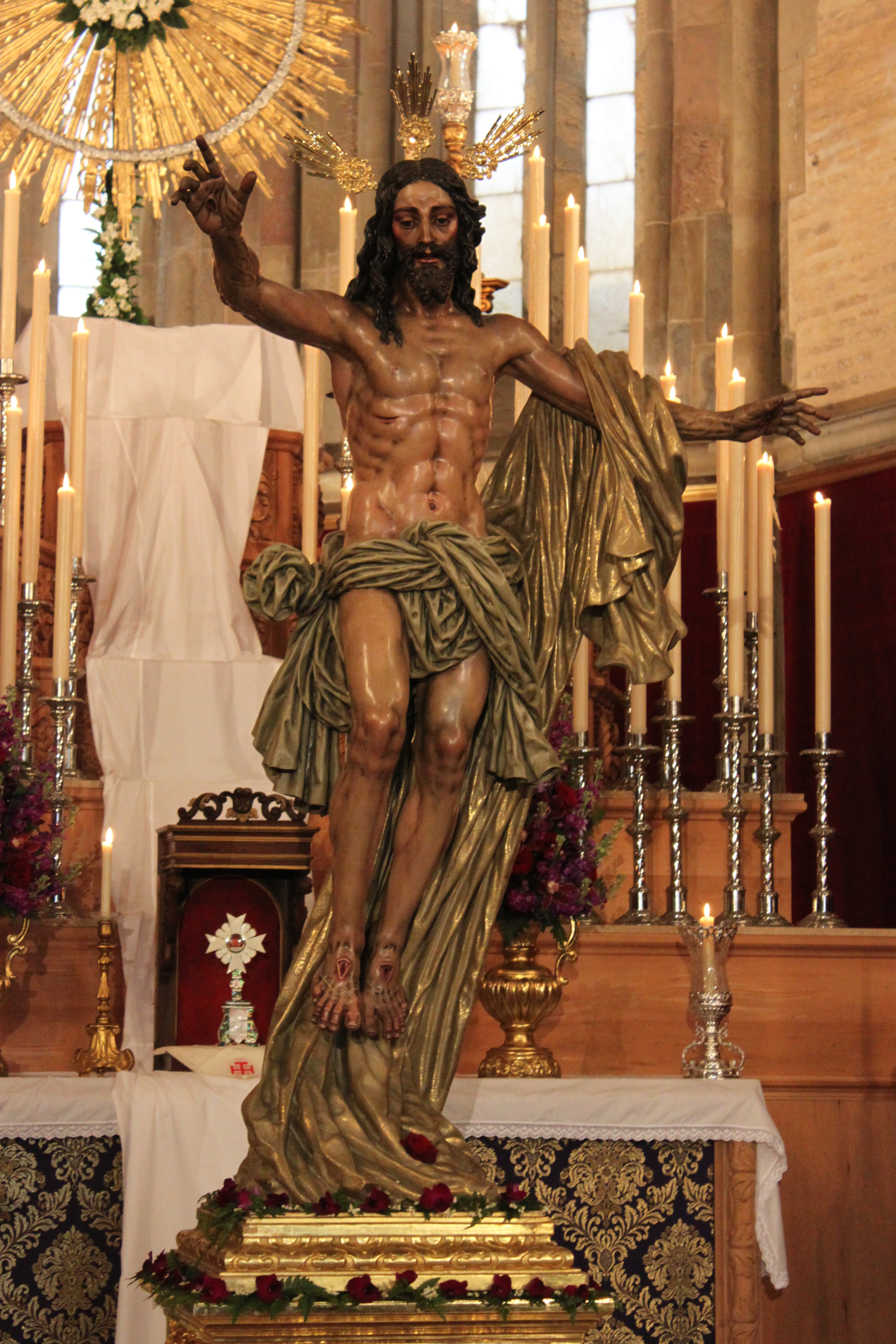 Titular de la Hermandad de la Resurreección de Sevilla.